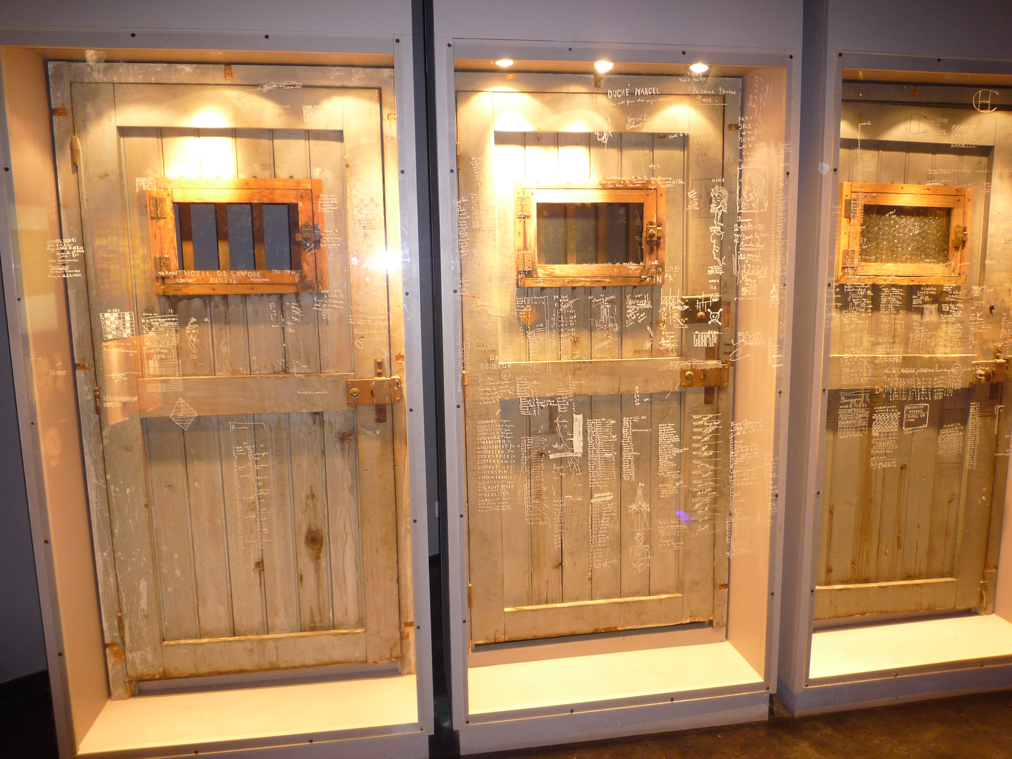 Portes des cellules de la Gestapo. Musée de la Résistance et de la Déporation de l'Isère.